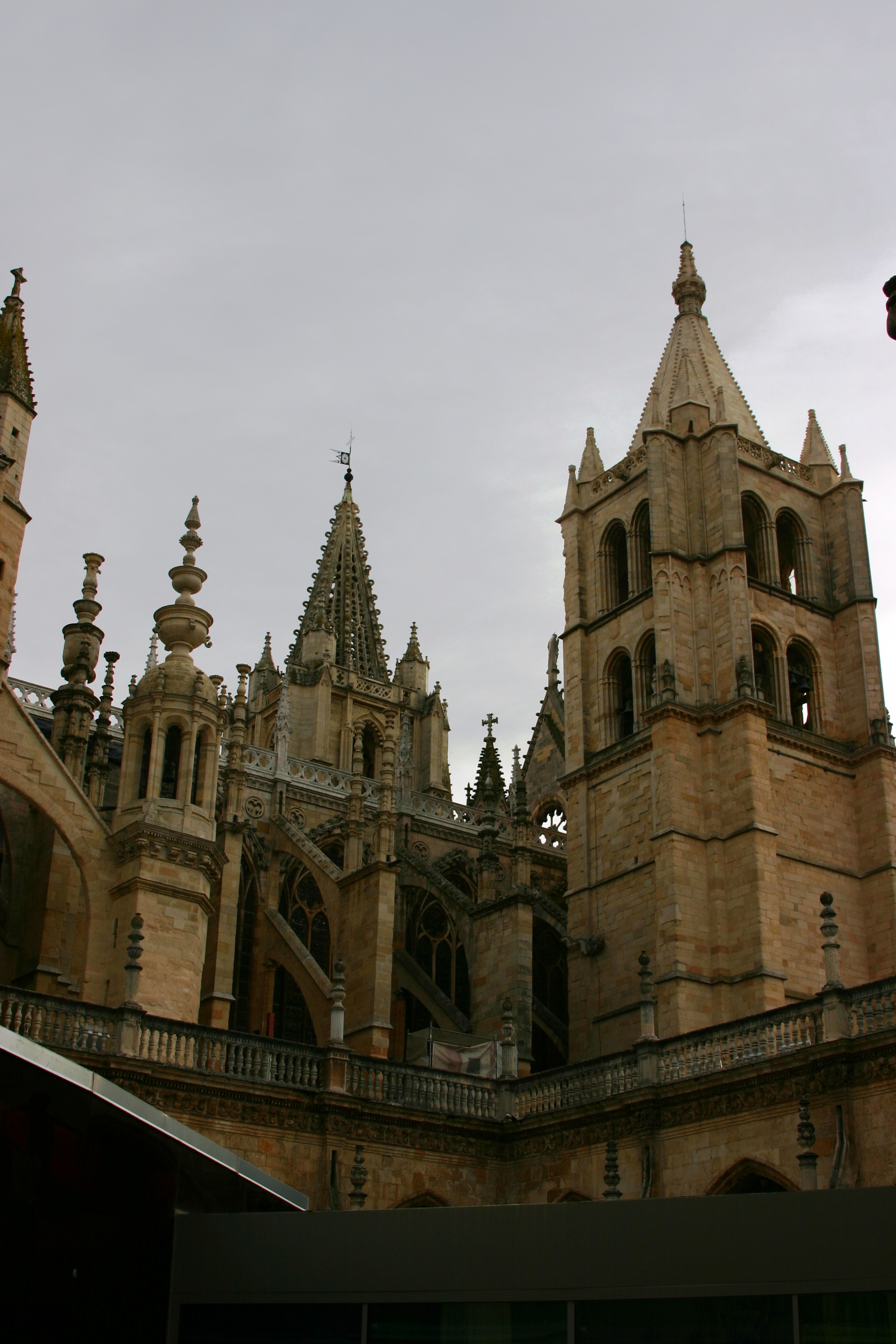 Detalhe da fachada oeste